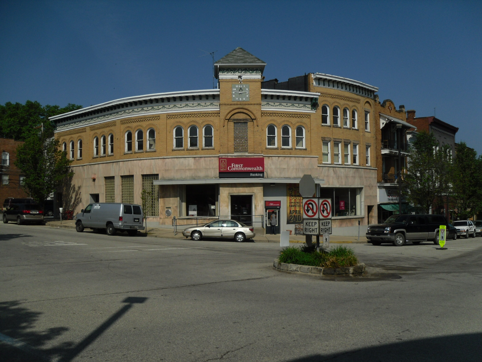 Vandergrift, Pennsylvania